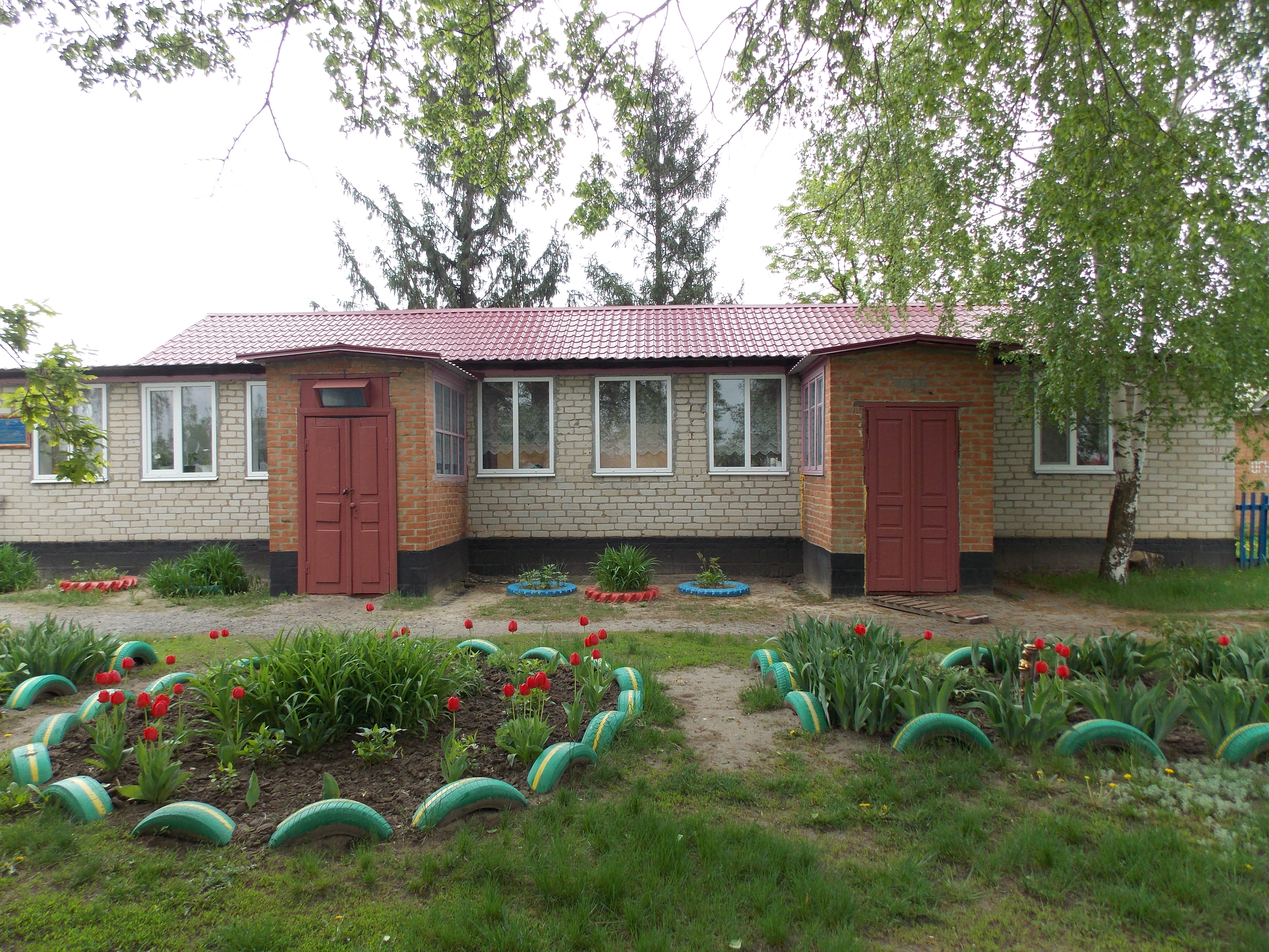 Дитсадок "Струмочок", Підлиман.